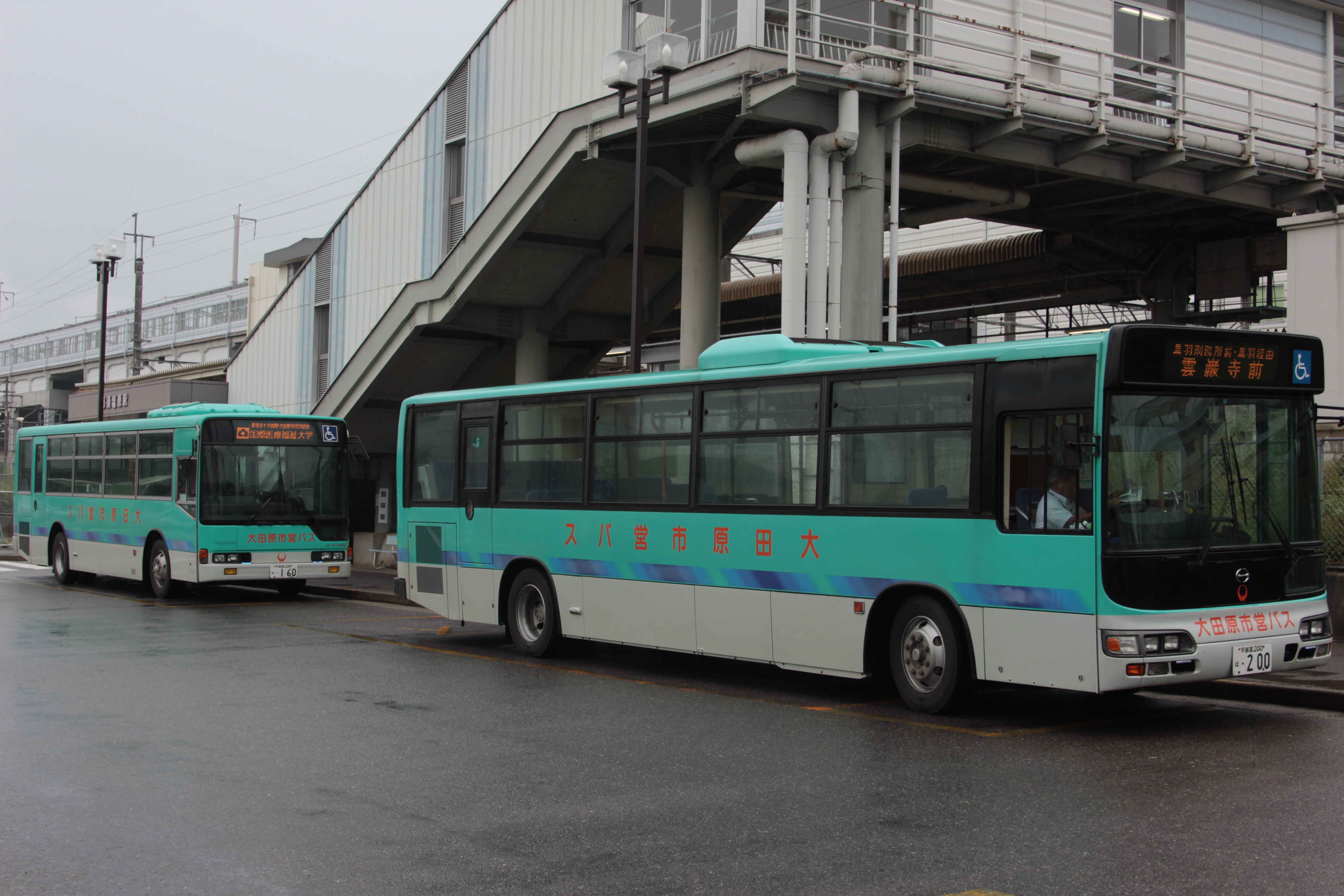 那須塩原駅に停車している大田原市営バス。雲厳寺線と那須塩原駅線。